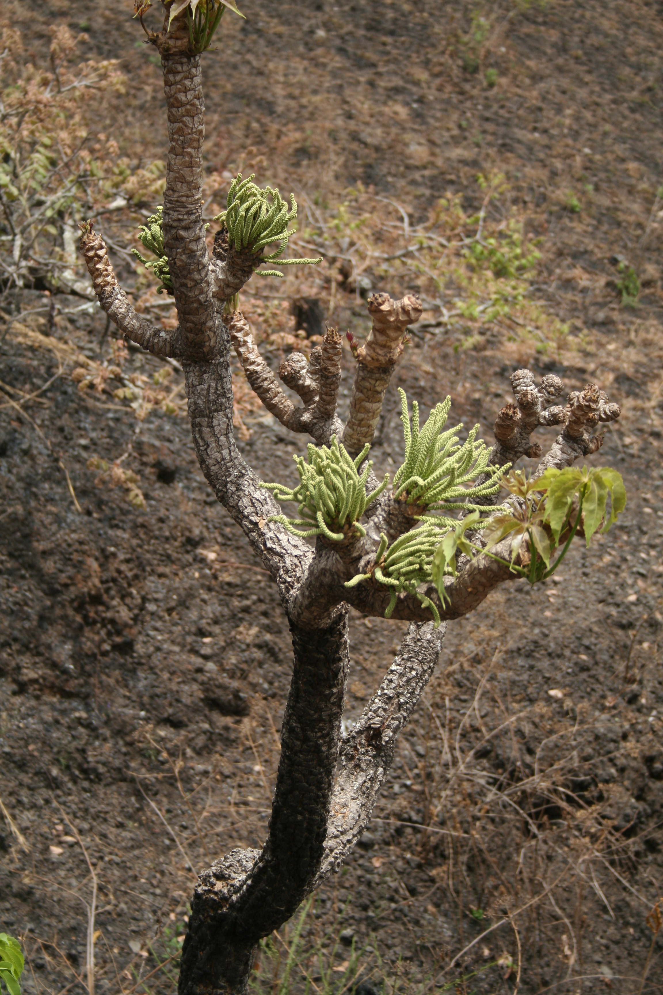 Cussonia arborea, Mt. Mbati, Cameroon